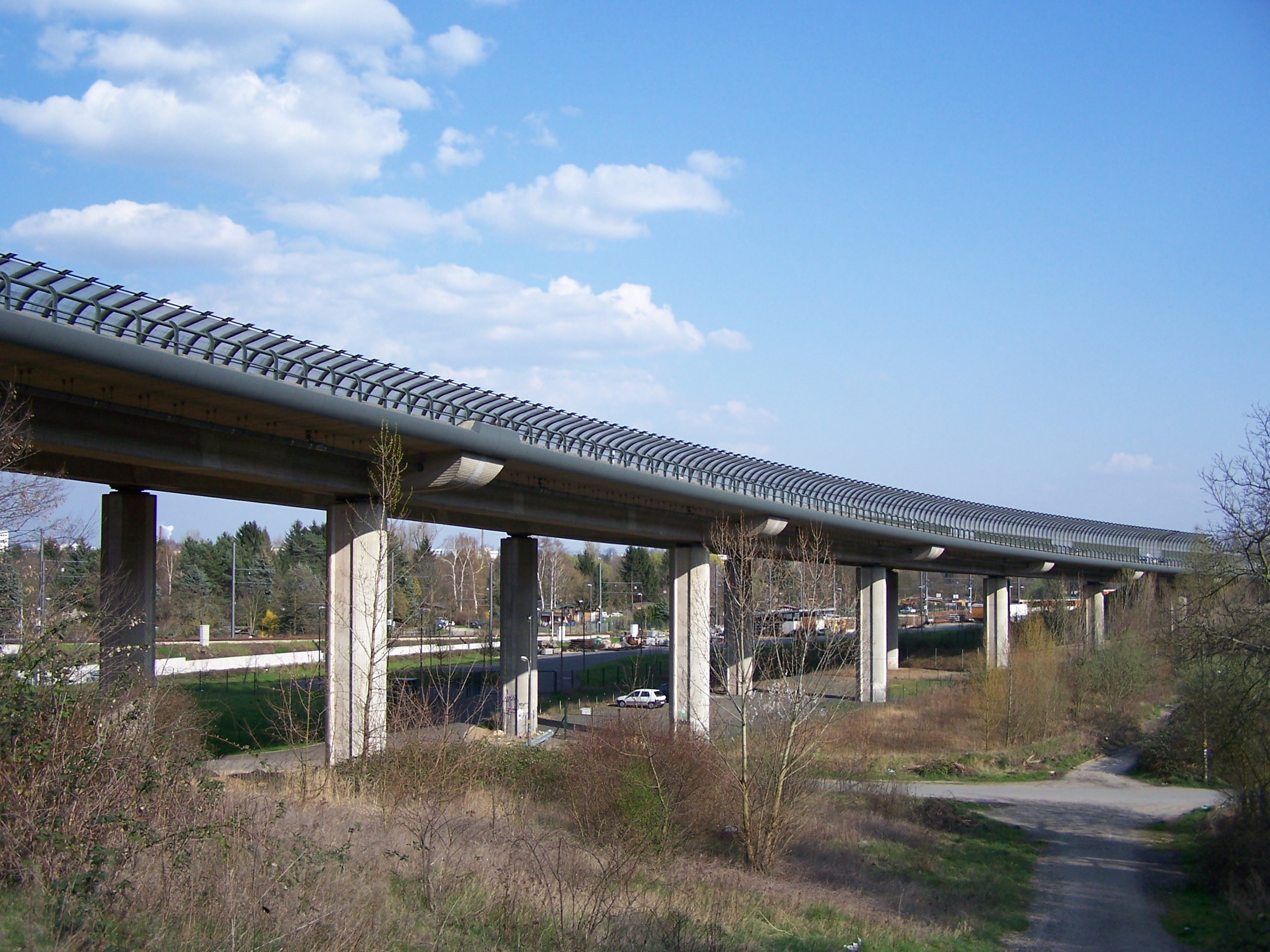 Autobahnbrücke über das Riedgrabental am Bornheimer Hang